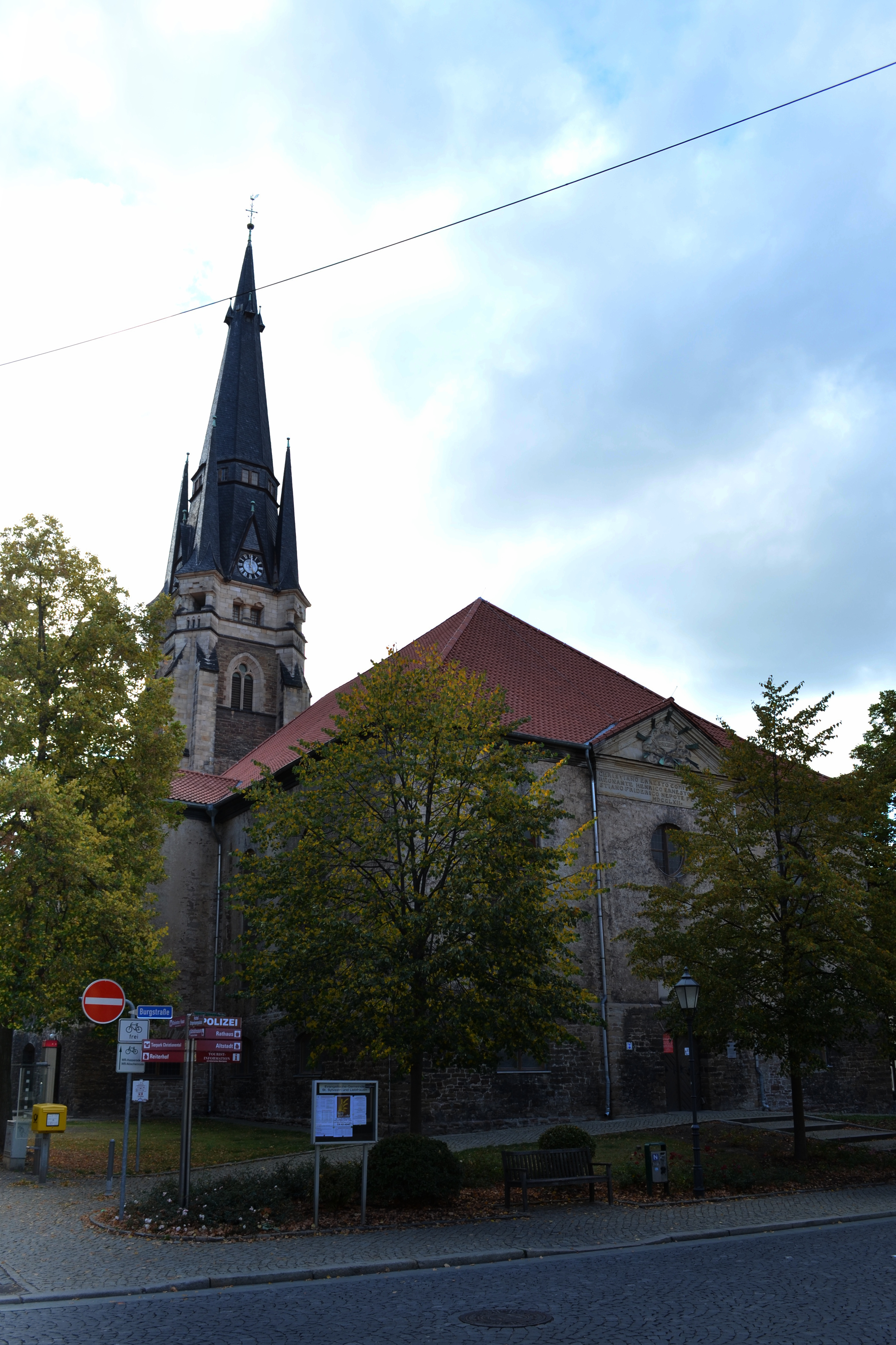 Liebfrauenkirche - Onze-Lieve-Vrouwekerk